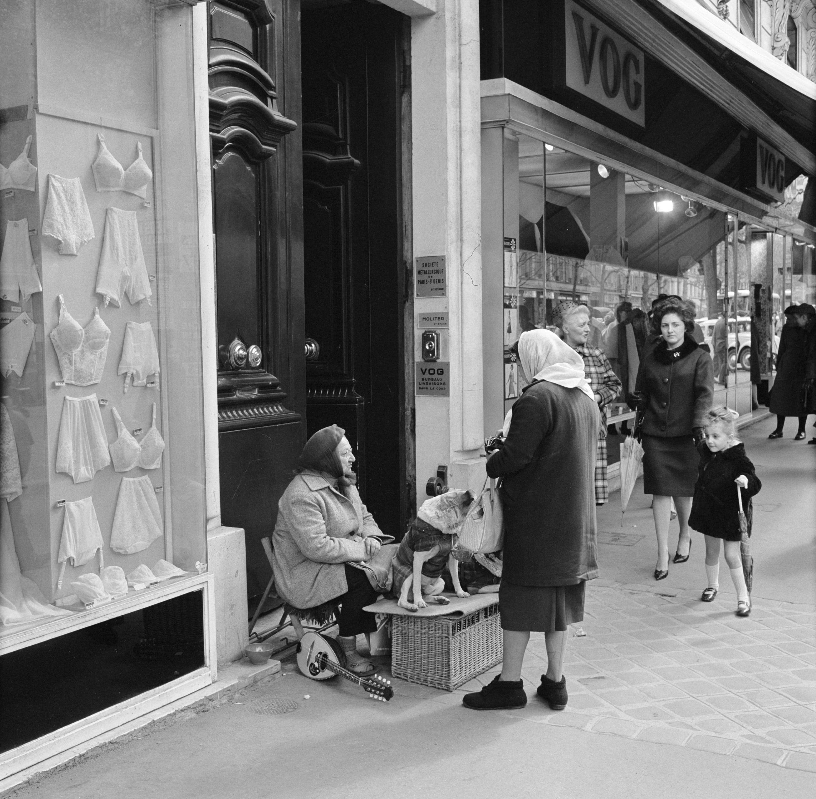 Collectie / Archief : Fotocollectie Van de Poll Reportage / Serie : Pariser Bilder [Het straatleven van Parijs] Beschrijving : Vrouw geeft geld aan een straatmuzikante en haar twee honden Datum : 1965 Locatie : Frankrijk, Parijs Trefwoorden : etalages, honden, lingerie, snaarinstrumenten, straatartiesten, straatbeelden, winkels Fotograaf : Poll, Willem van de Auteursrechthebbende : Nationaal Archief Materiaalsoort : Negatief (6x6) Nummer archiefinventaris : bekijk toegang 2.24.14.02 Bestanddeelnummer : 254-0346